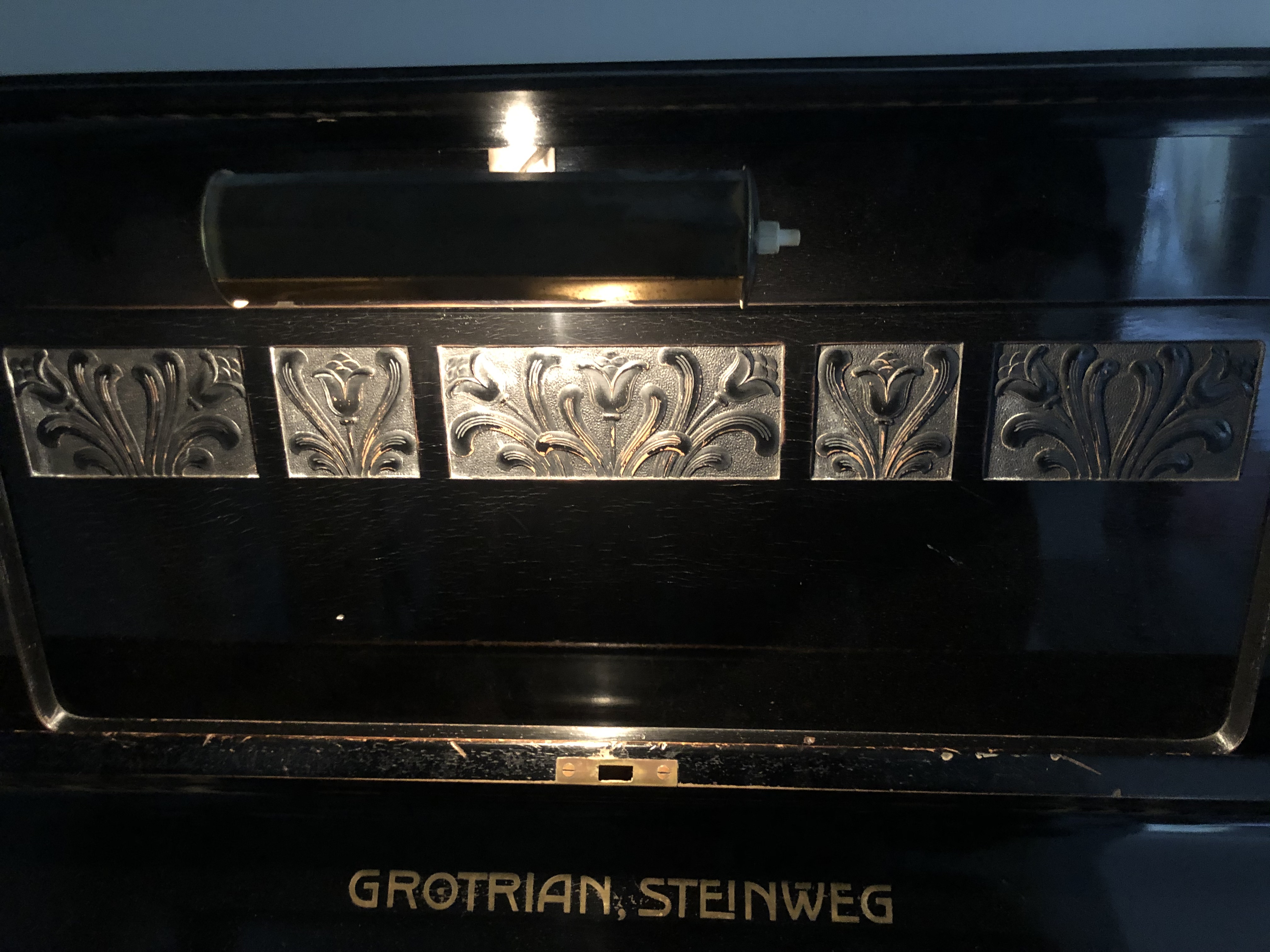 Schriftzug Jugendstil 1914